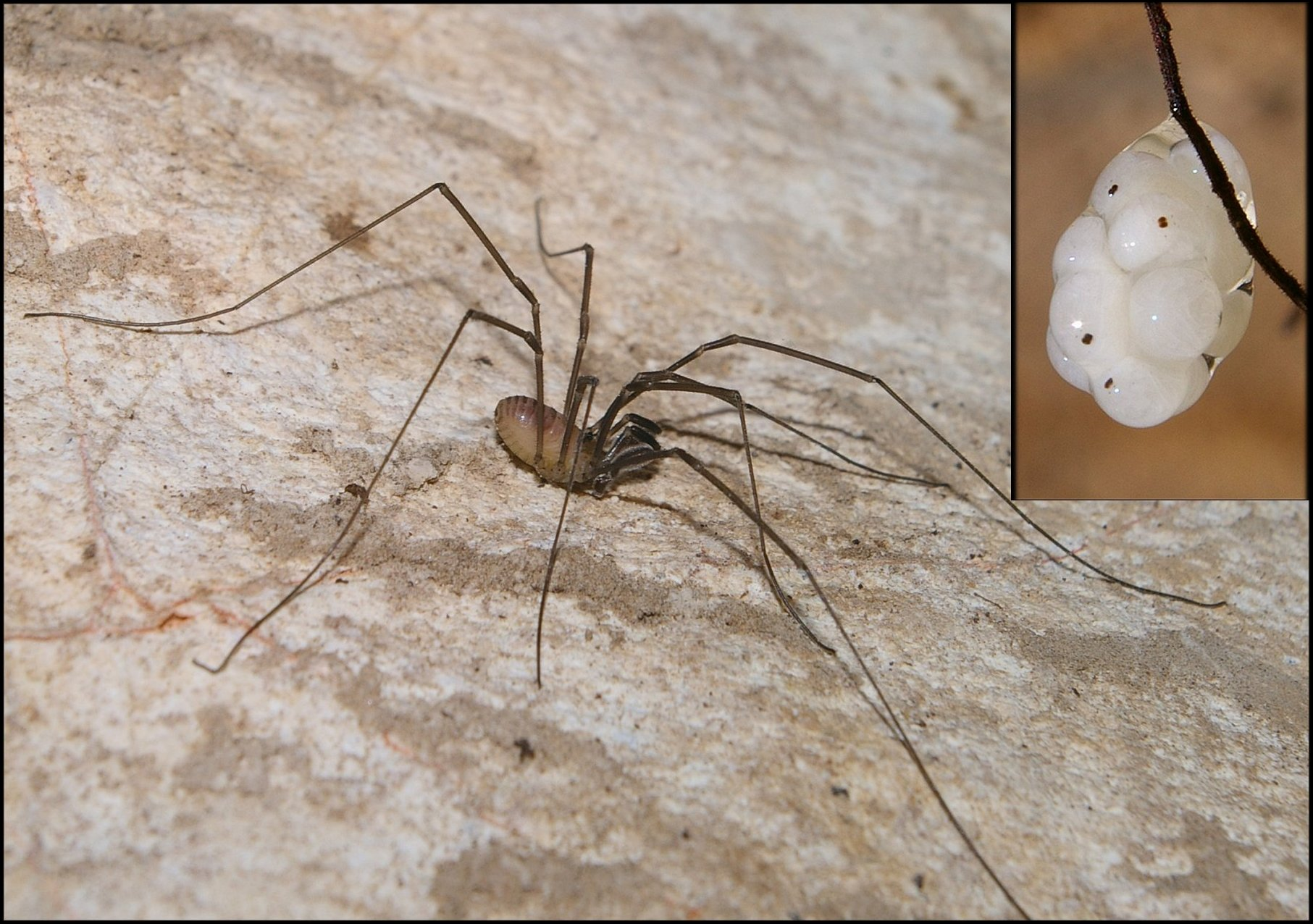 Sabacon paradoxum en vue dorsale. Grotte, ouest de l' Hérault. Ponte, détail